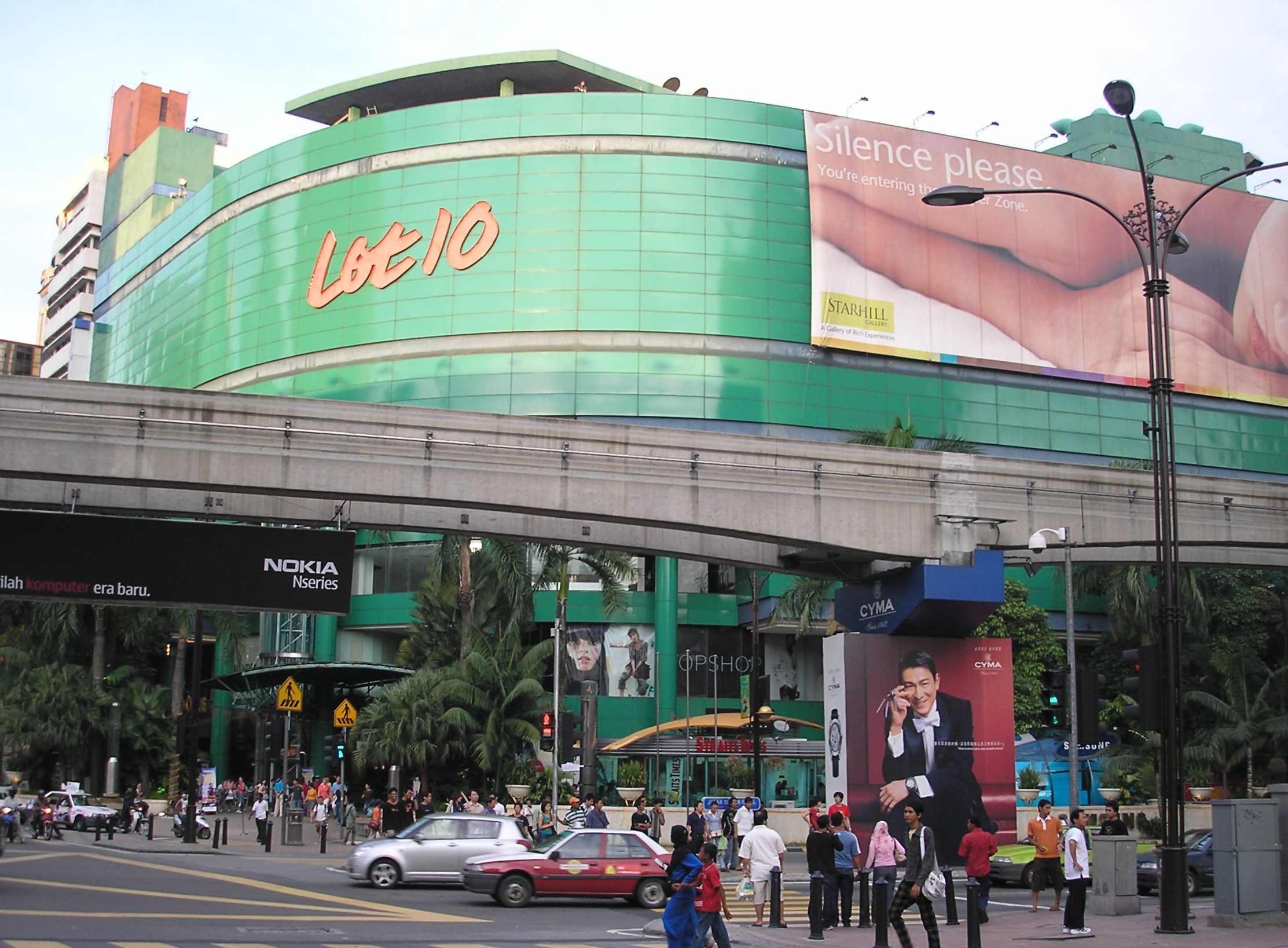 The Lot 10 shopping mall at Bukit Bintang (Star Hill), in Kuala Lumpur, Malaysia.